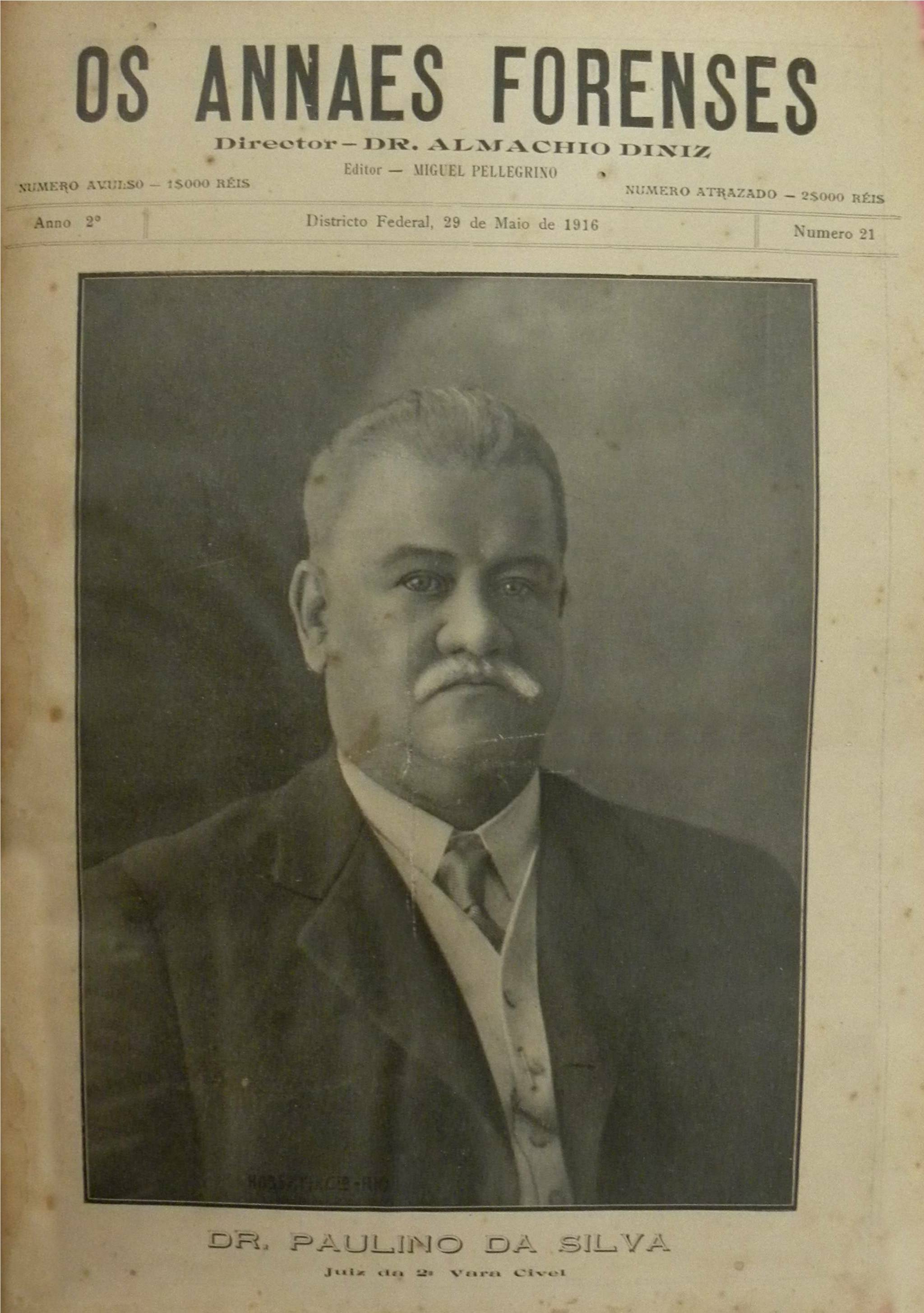 Magistrado brasileiro, do início do século XX.Foto da capa de Revista publicada no Rio de Janeiro - Brasil, no ano de 1916